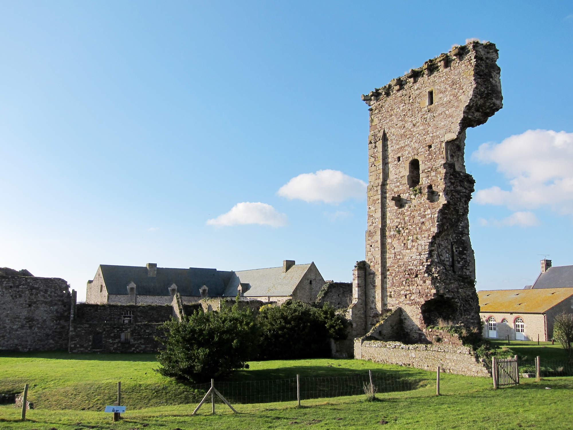 Le donjon du château de Regnéville-sur-Mer (Manche).